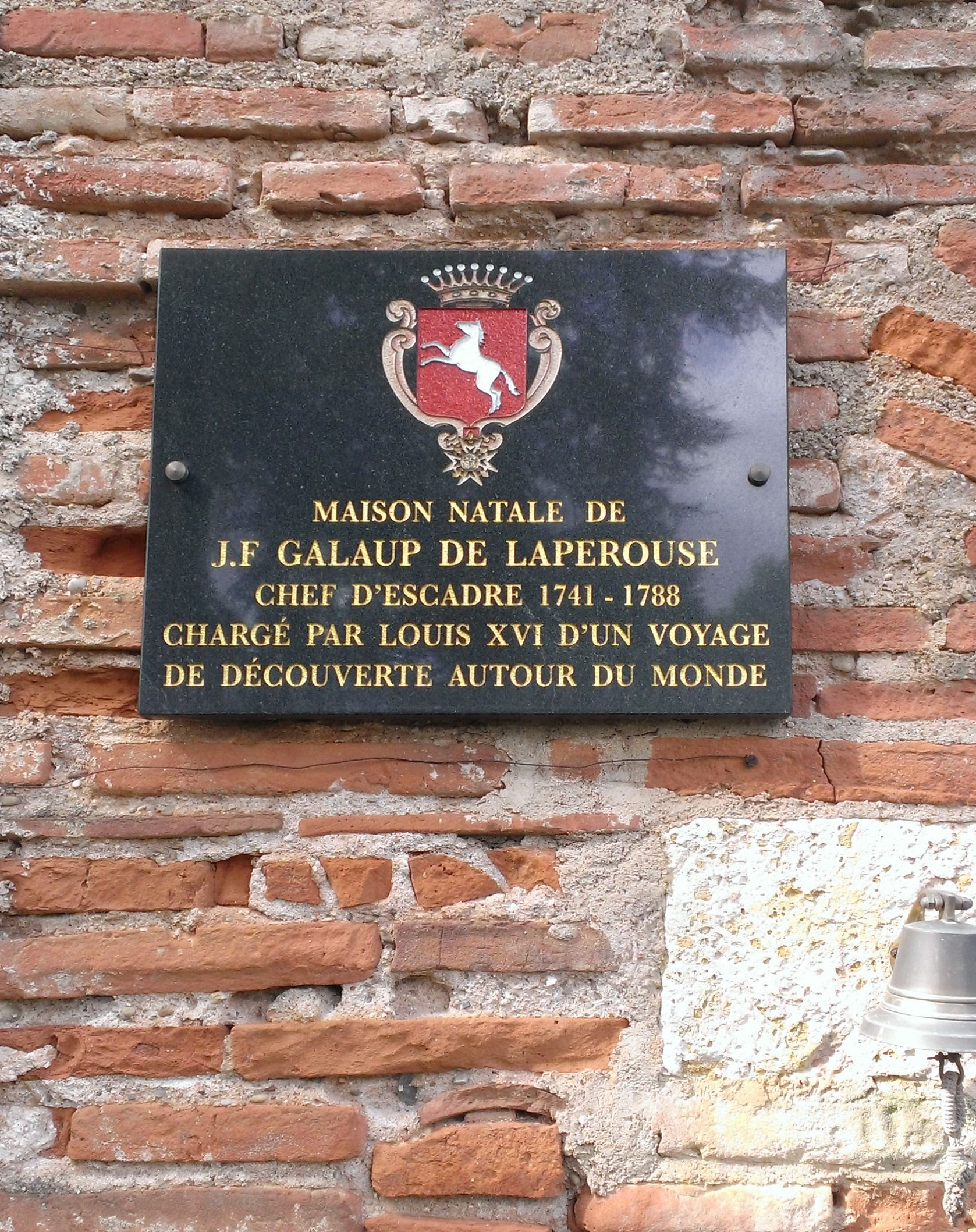 Plaque officielle sur le mur d'entrée du Château du Gô